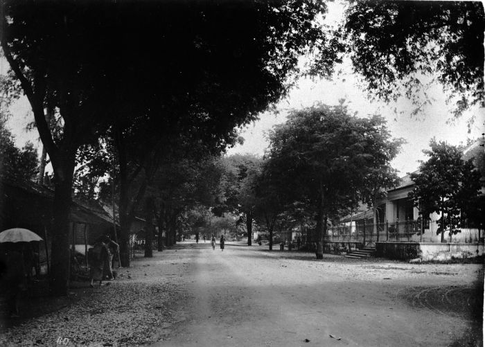 Foto. De wijk Bintaran bij Djokjakarta.